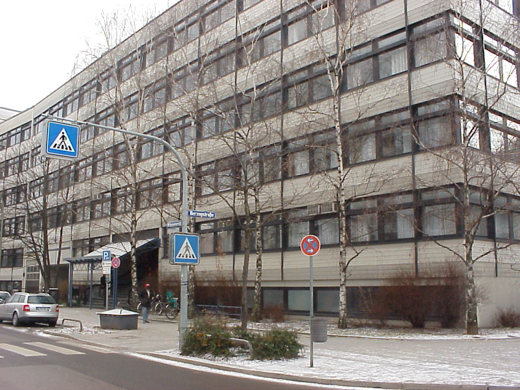 Landesarbeitsgericht München